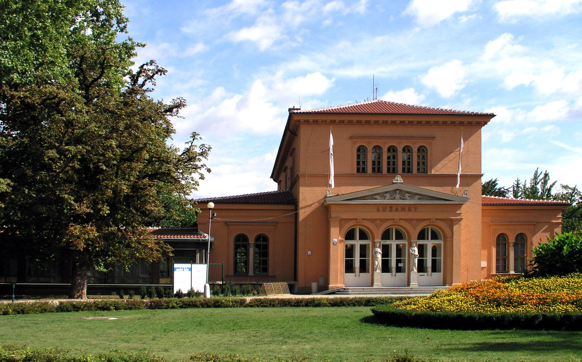 budova SVČ Lužánky v parku Lužánky, Brno